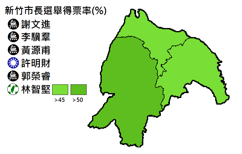 新竹市長選舉得票分布。